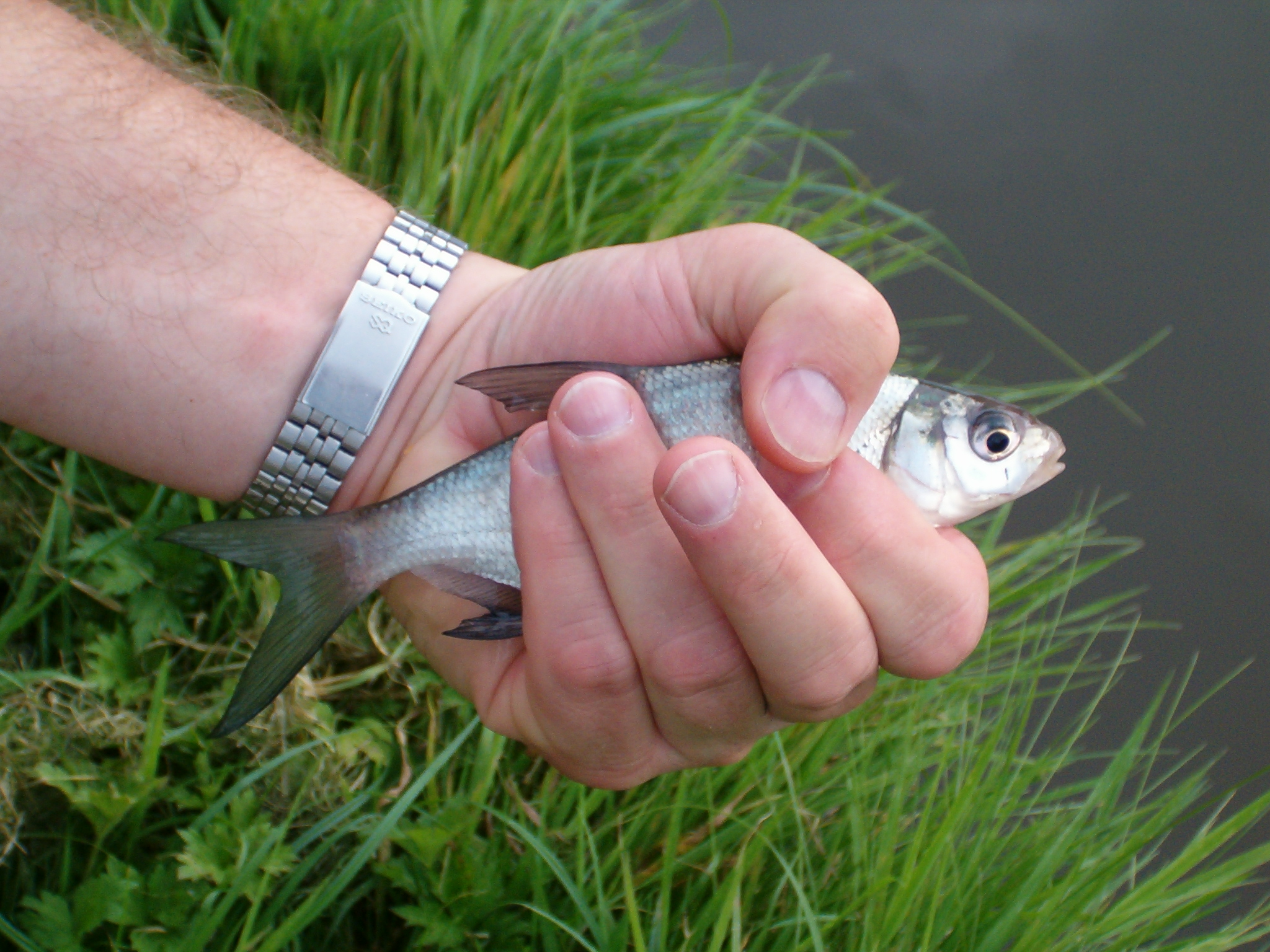 A fish (Abramis brama), self made picure